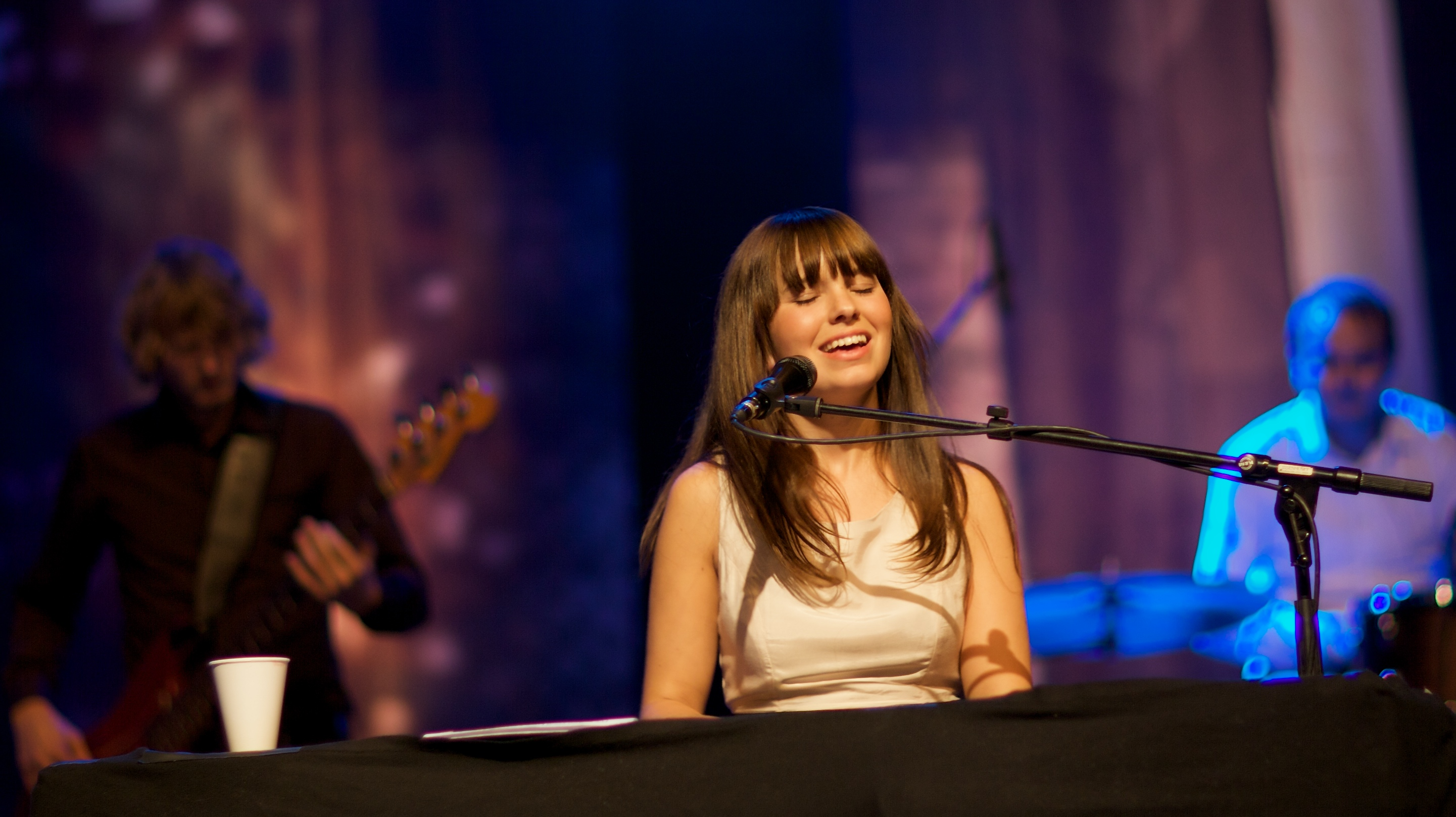 Marit Larsen med Trondheimssolistene i Ibsenhuset